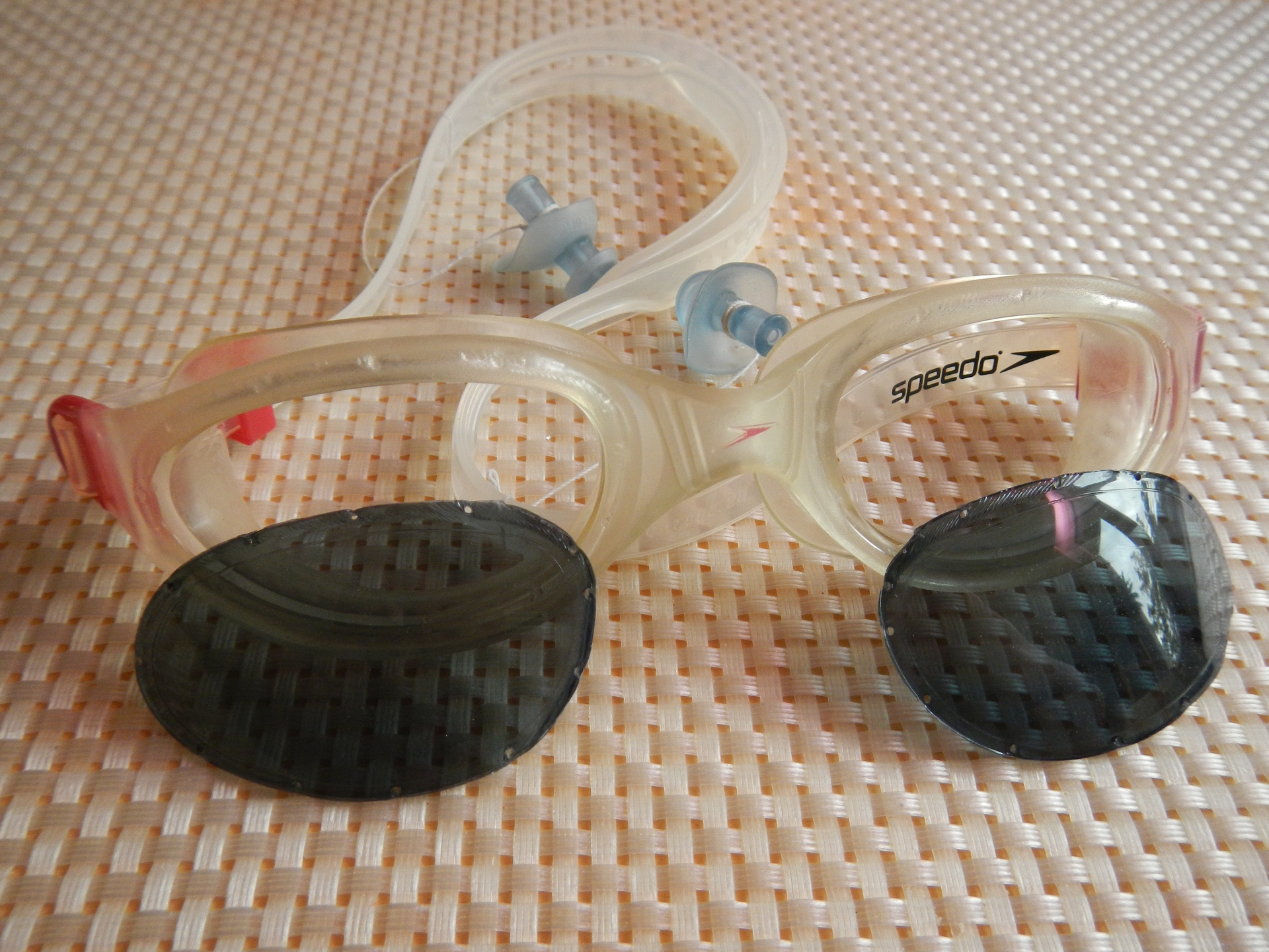 Очки для плавания с мягким корпусом и снятыми вынутыми стеклами. Видна перфорация, удерживающая стекла в силиконе.